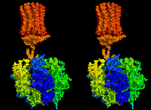 ATP-Synthase (stereoskopische Abbildung der Kristallstruktur 1QO1)